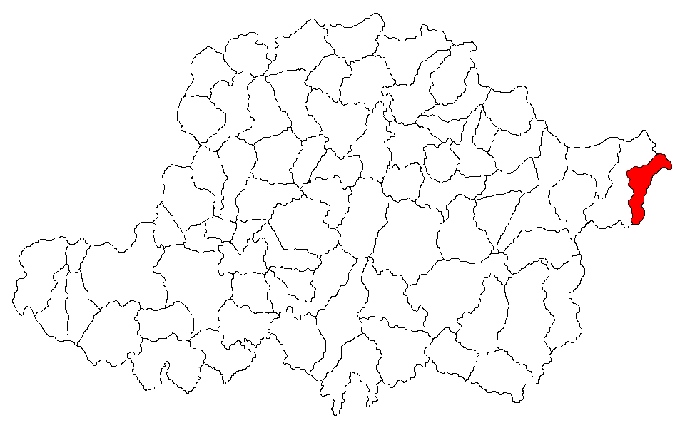 Categorie:Hărţi ale judeţului Arad